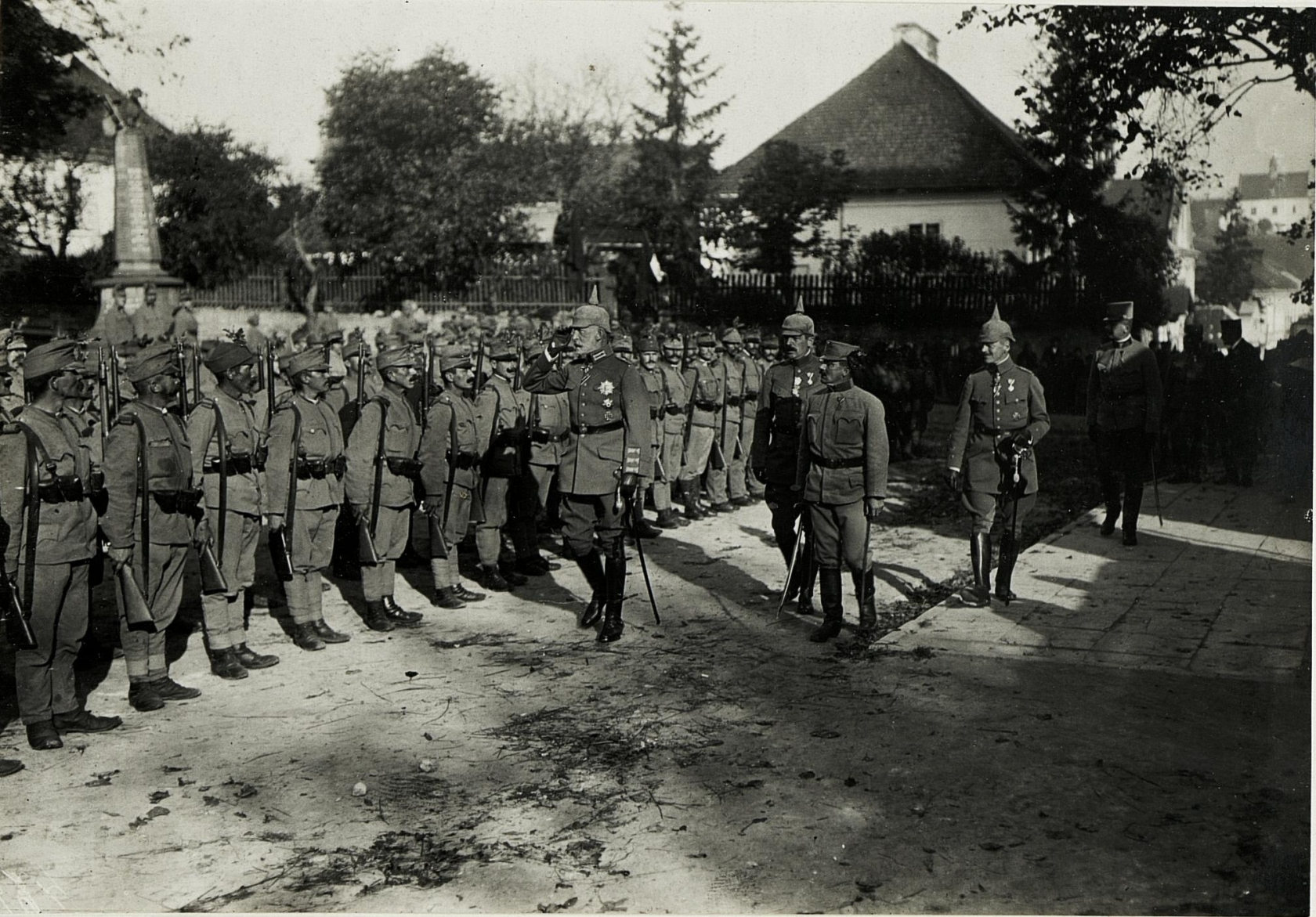 Allerhöckste Namenstagfeier am 4.10.15 in Brzezany.